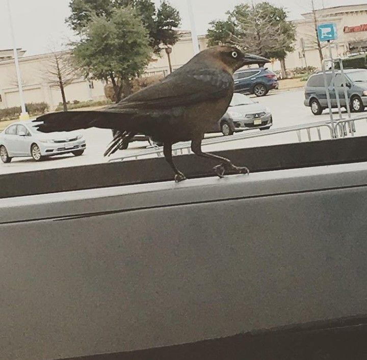 Quiscalus mexicanus hembra observando la CDMX